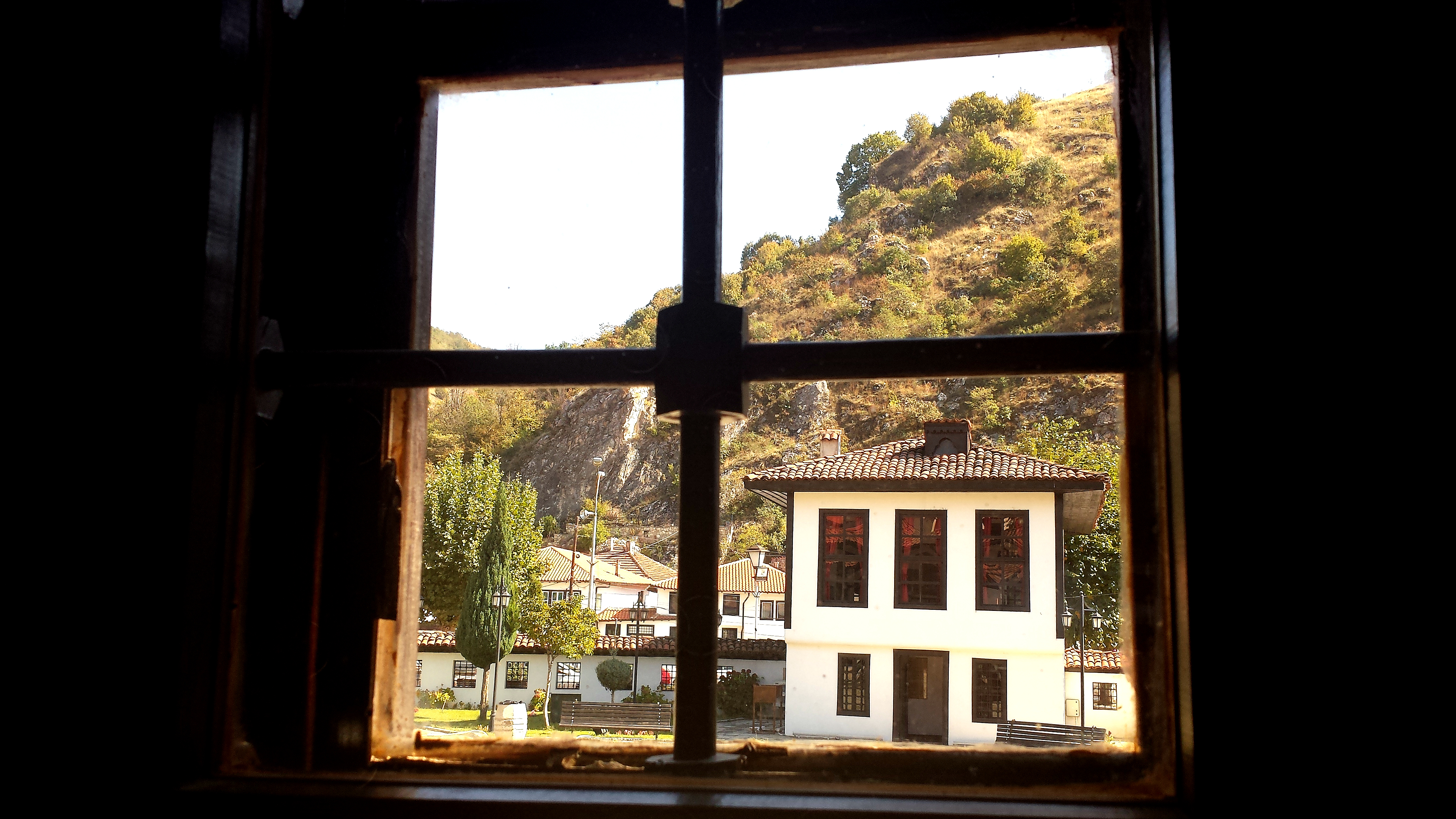 Kompleksi Monumental i Lidhjes Shqiptare të Prizrenit